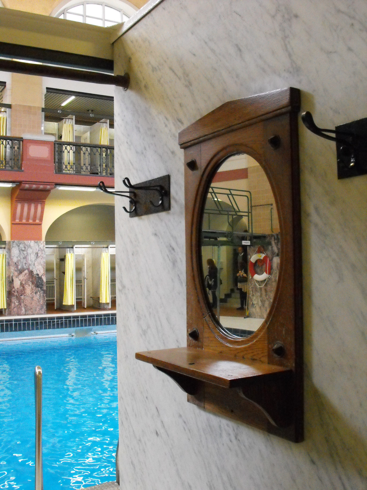 Detail der unteren Umkleidekabinen in der Großen Schwimmhalle